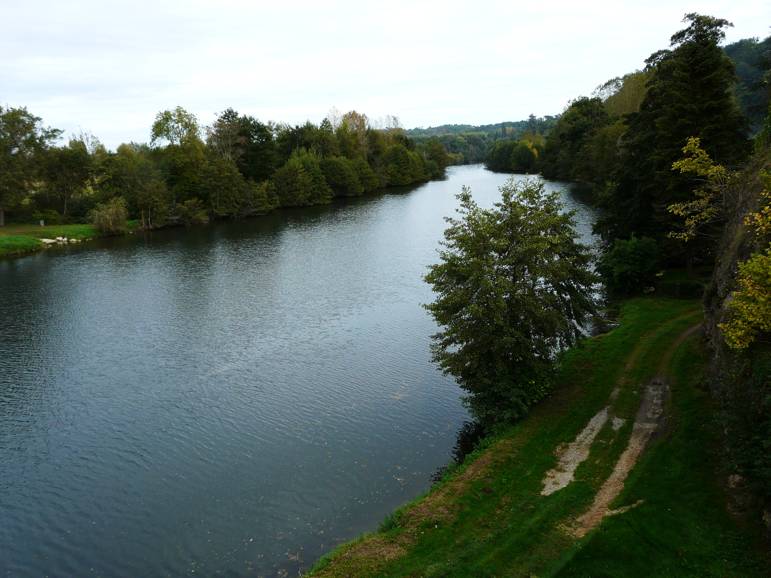 L'Isle en amont du pont de la route départementale 3E5, entre Saint-Louis-en-l'Isle (à gauche) et Sourzac (à droite), Dordogne, France.